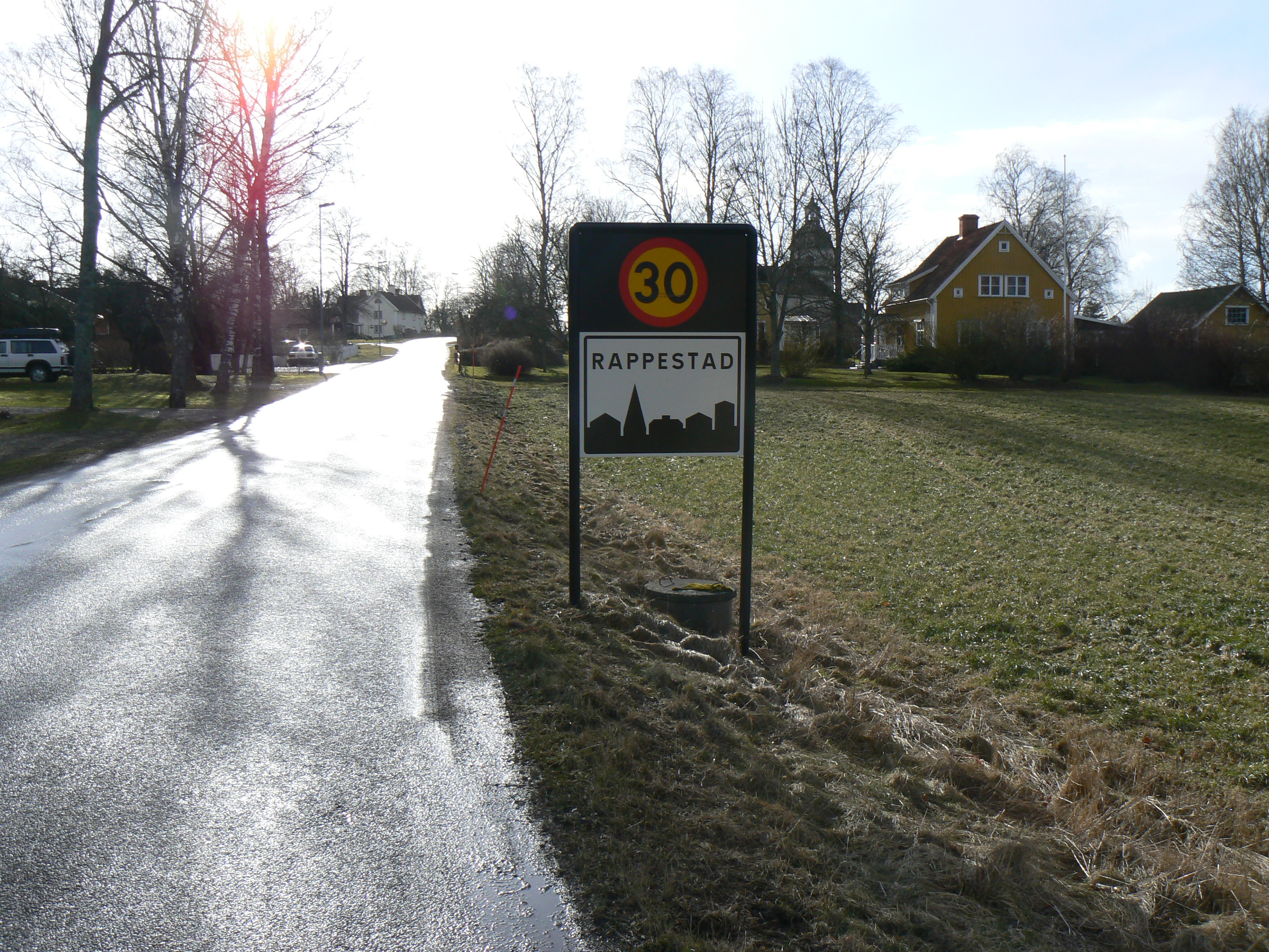 Rappestad village, Linköping municipality, Sweden. Photo by Skvattram 2007-03-18.